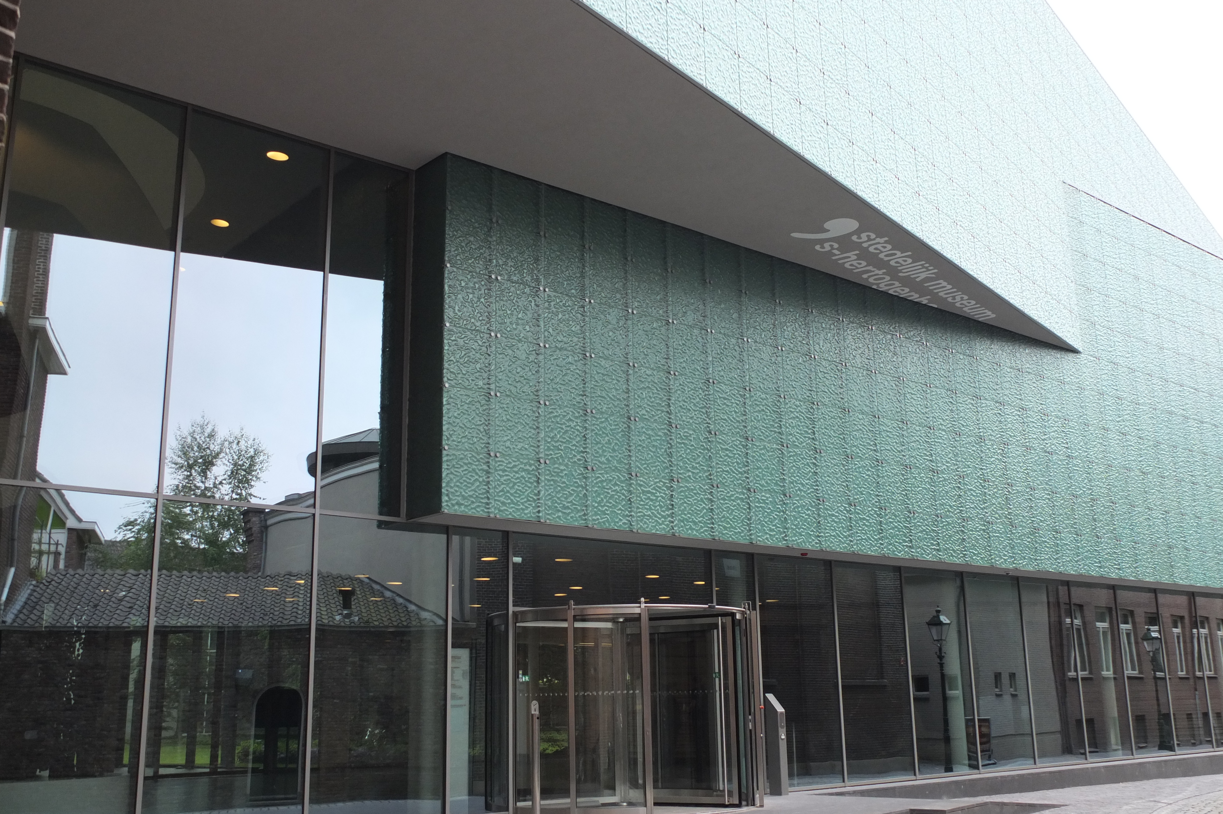 Stedelijk Museum 's-Hertogenbosch